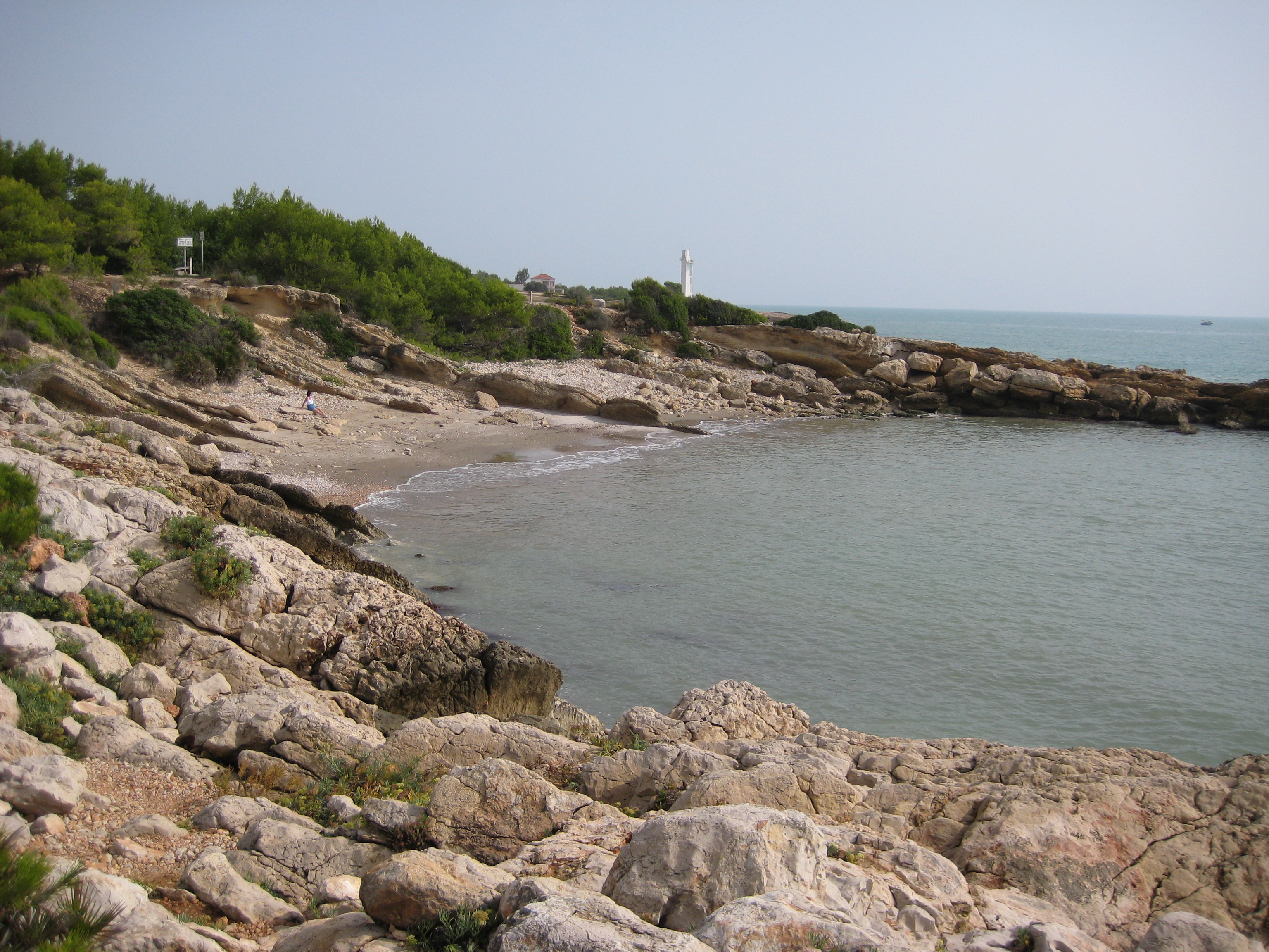 Cala Blanca, platja d'Alcalà de Xivert